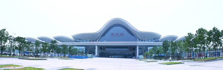 武汉火车站